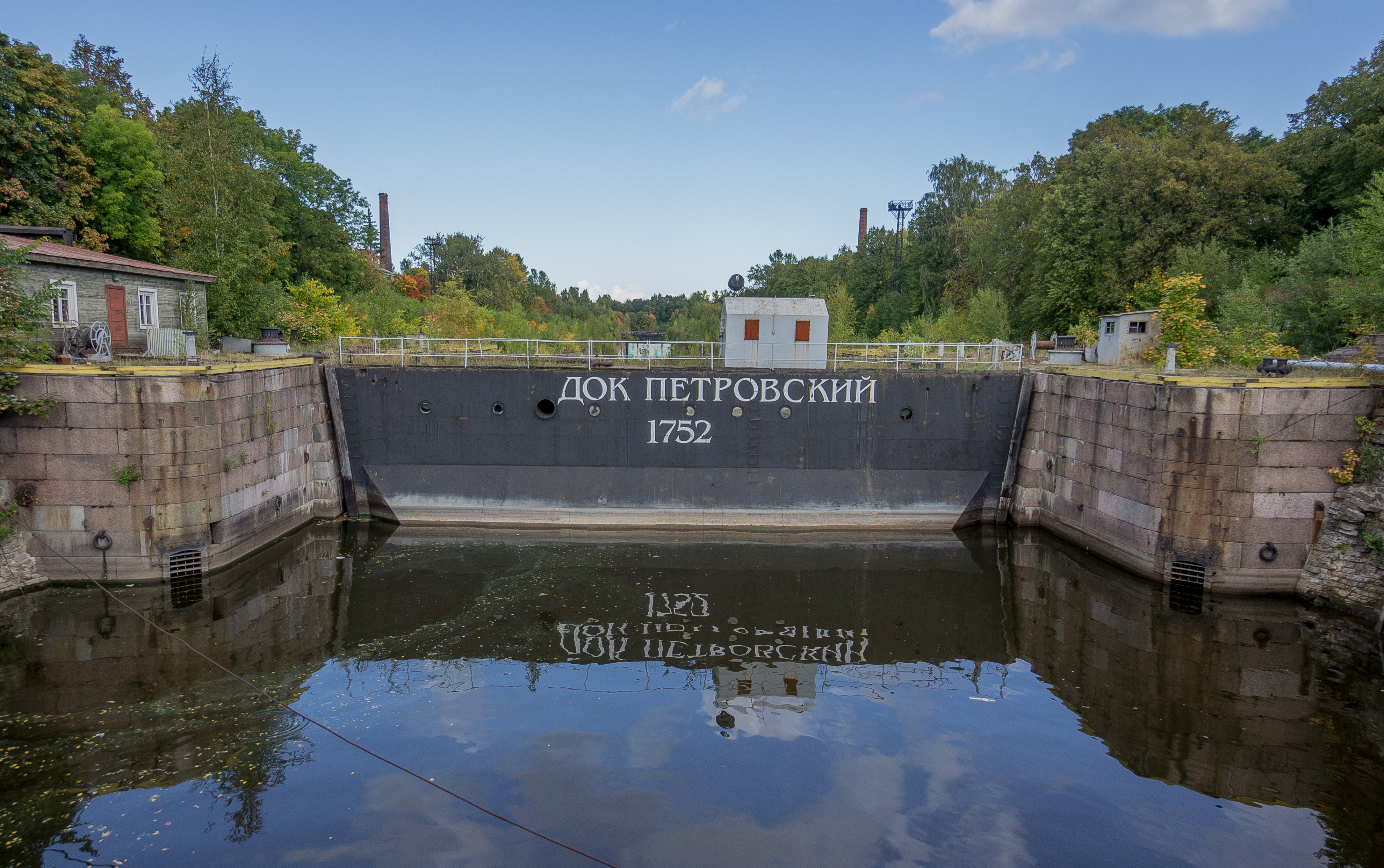 Док Петровский (южный): Адмиралтейство, Кронштадт, Кронштадтский район, Санкт-Петербург